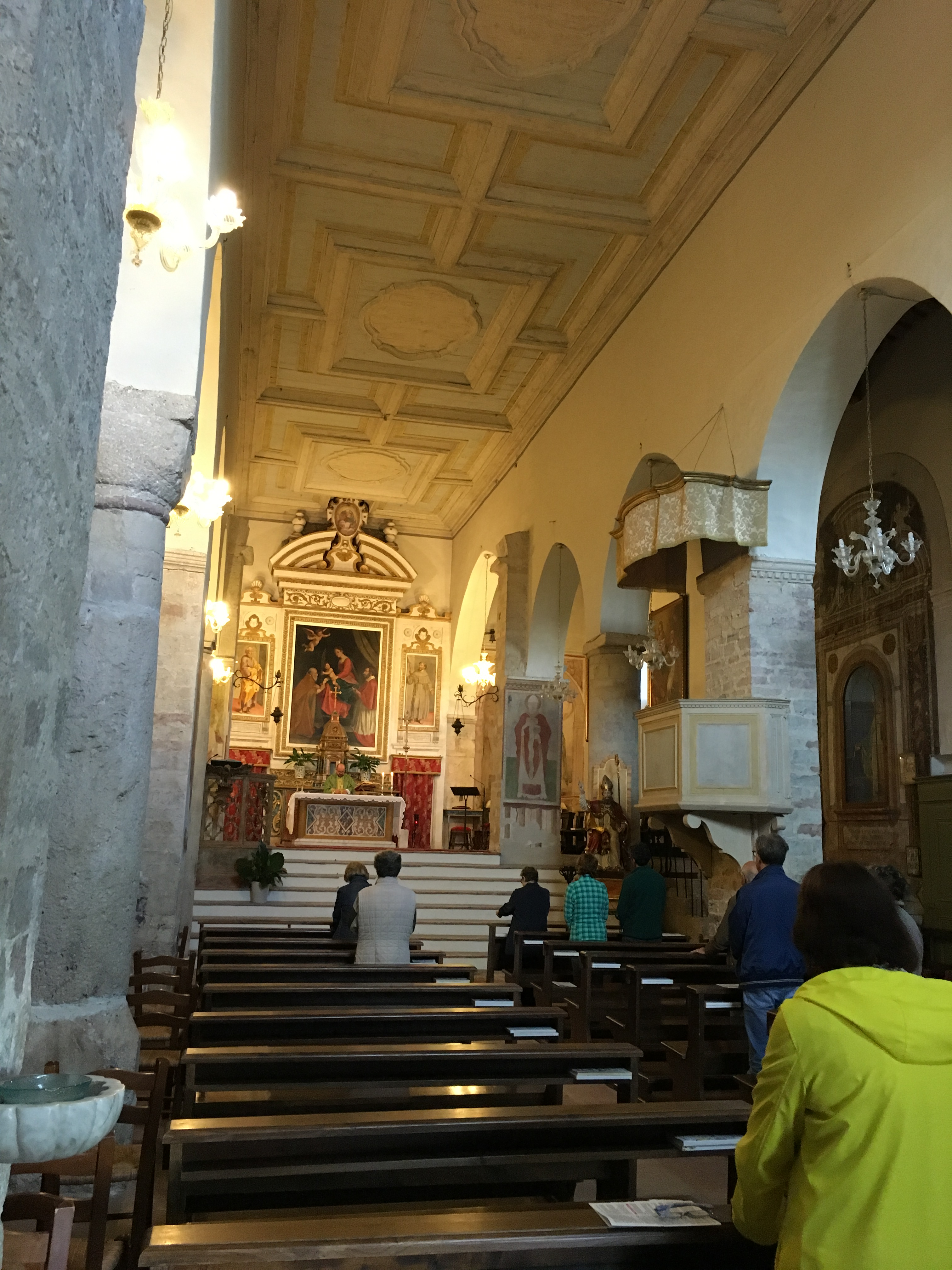 San Sabino Spoleto